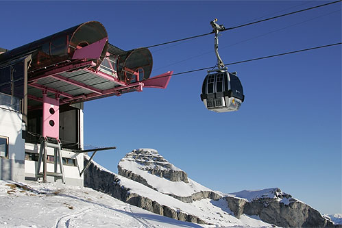 Leysin: Bergstation der Gondelbahn Leysin-La Berneuse